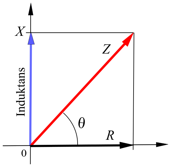 Fasvinkel vid induktans i krets